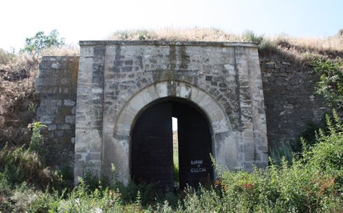 „Шишманова врата“